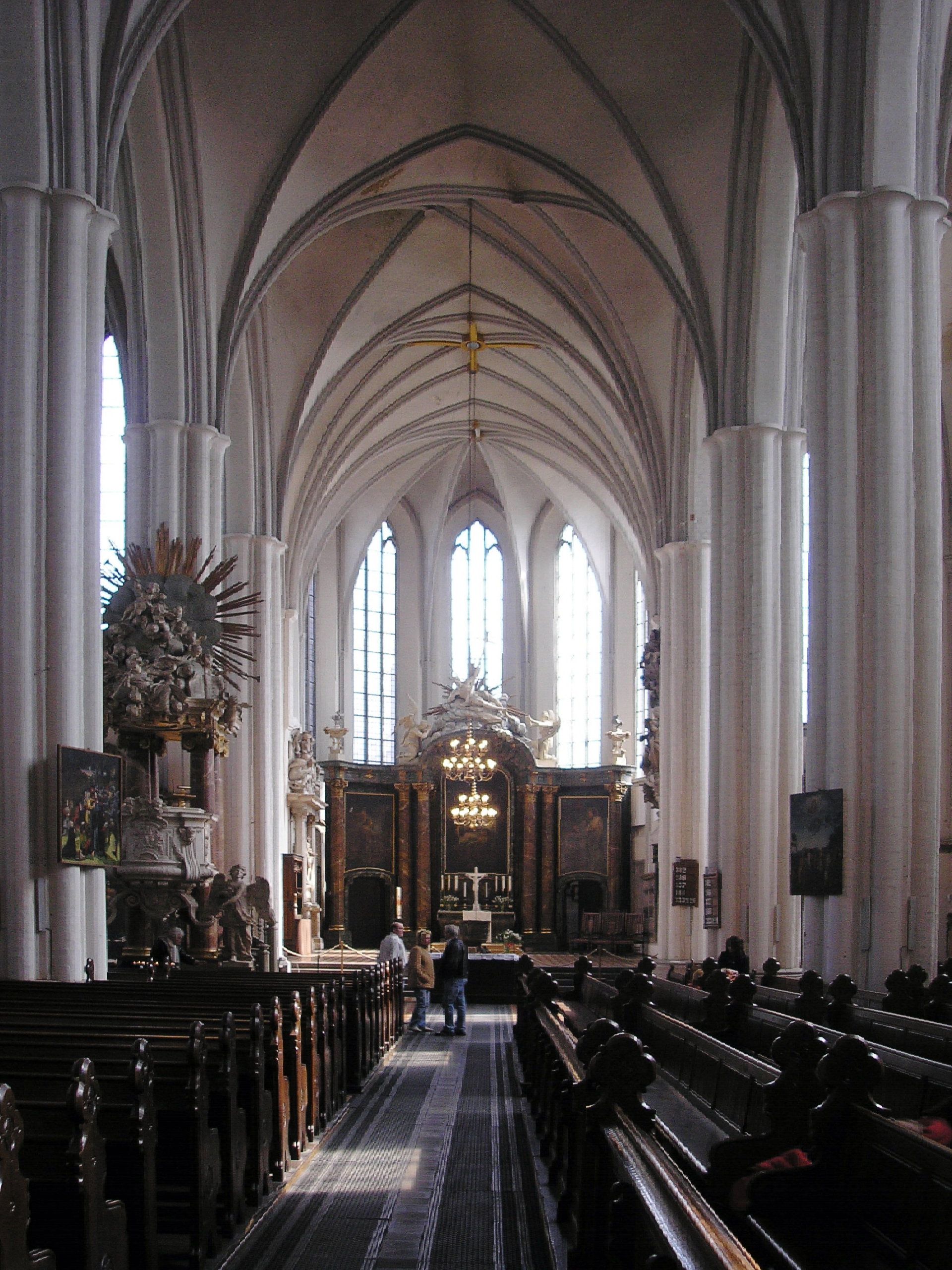 Blick in das Mittelschiff der St.Marien Kirche in Berlin-Mitte